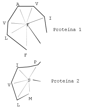 Gráfico de vectores átomo-a-átomo usados en el algoritmo de programación dinámica doble de SSAP